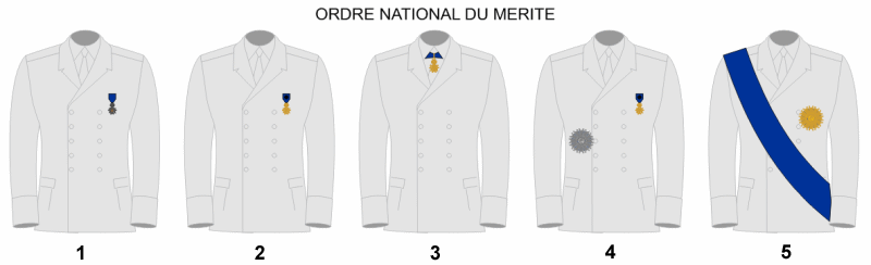 Ordre national du Mérite